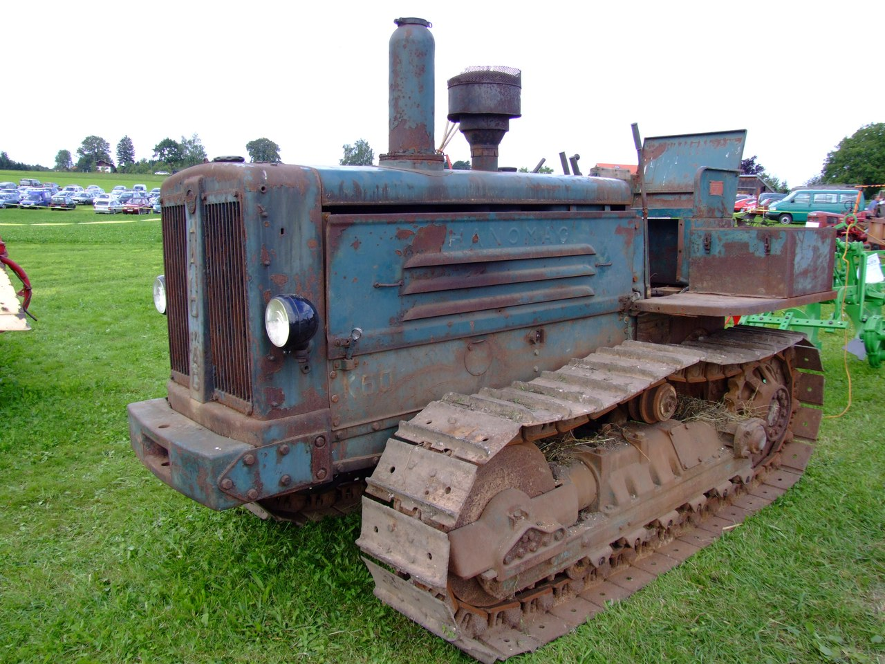 Hanomag-Kettenschlepper K 60, Baujahr 1956